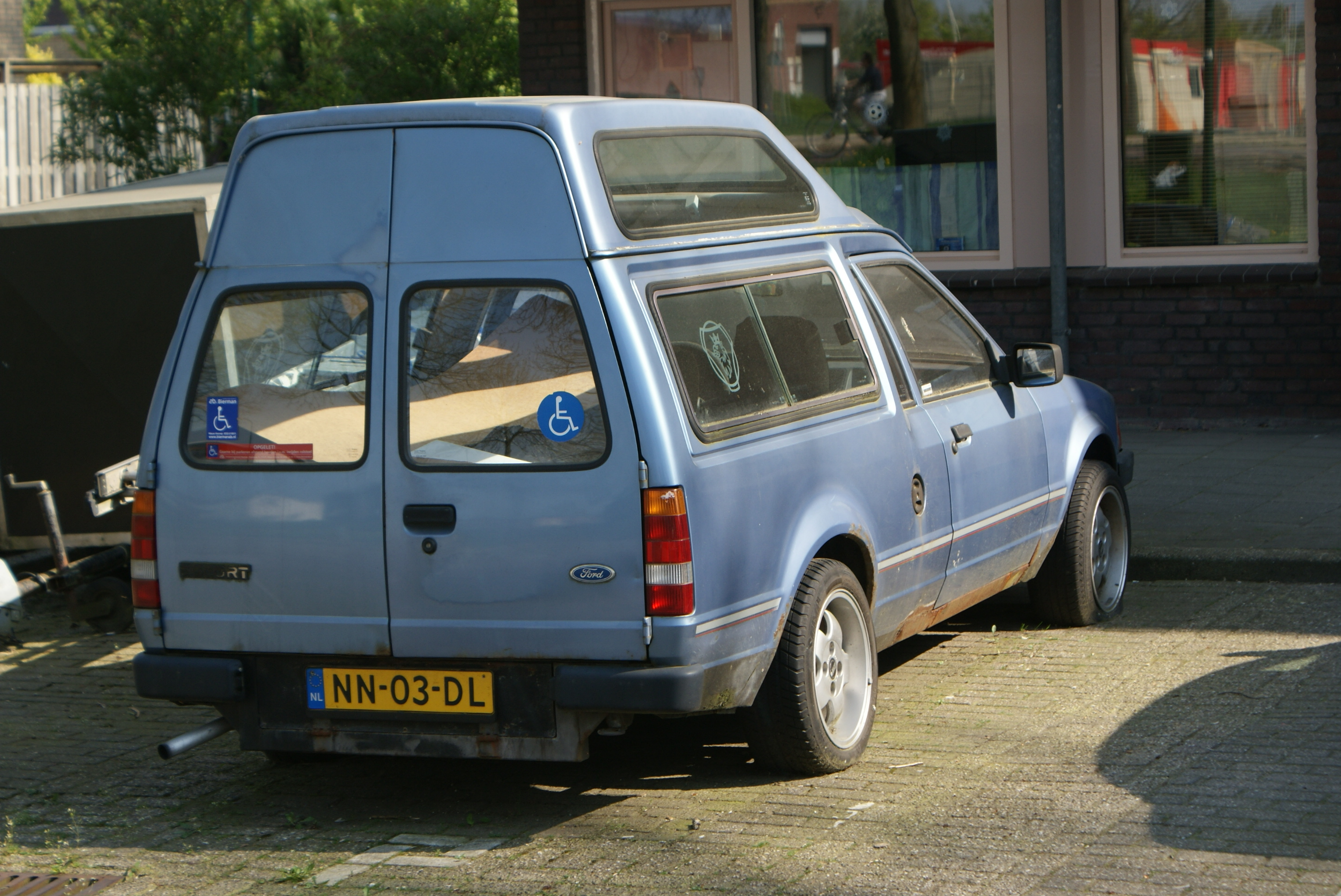 NN-03-DL, 1985 Ford Escort Van 1.6 Automatic